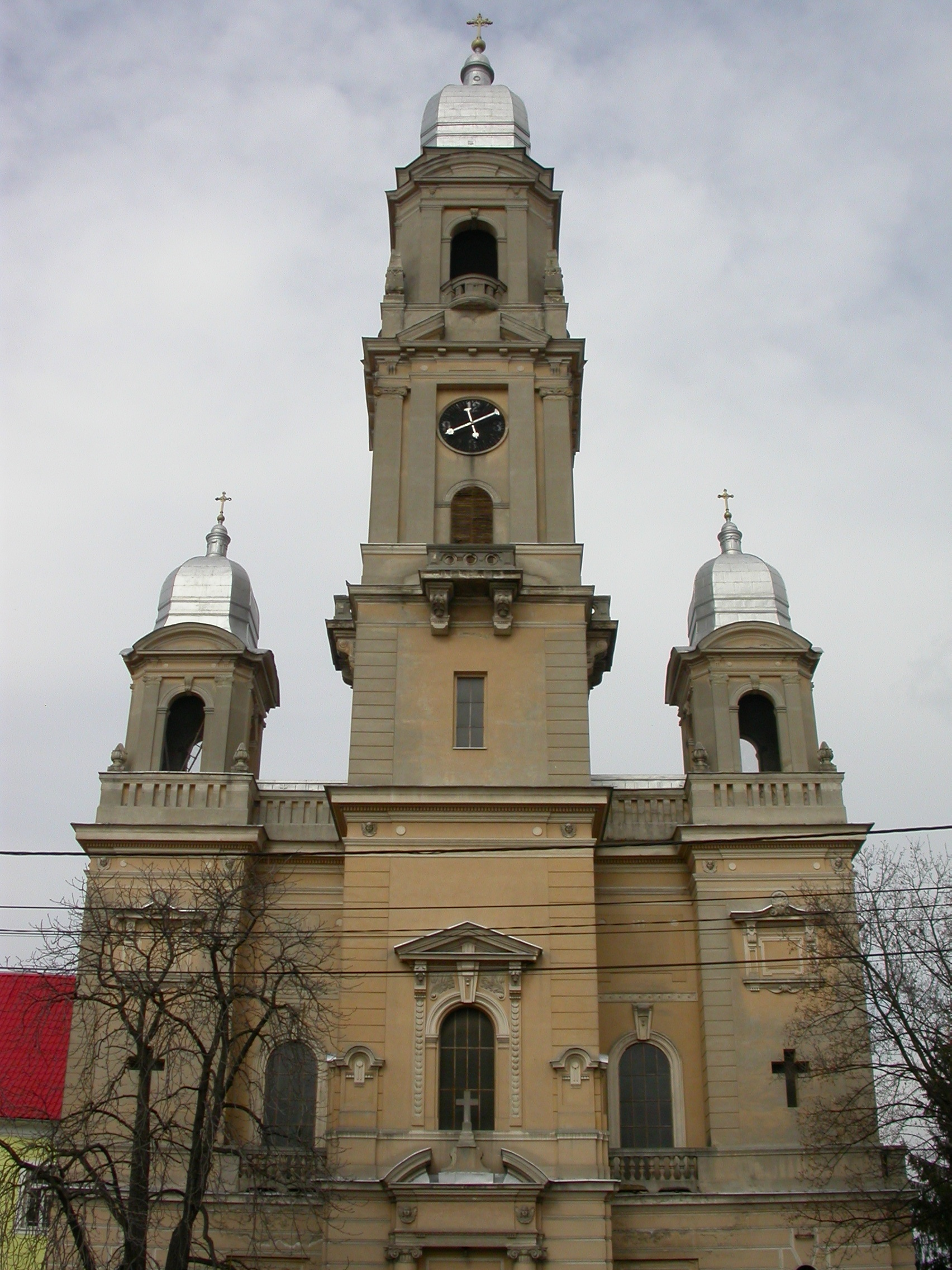 Biserica romano catolică "Pogorârea Sf. Spirit", 1903-1905